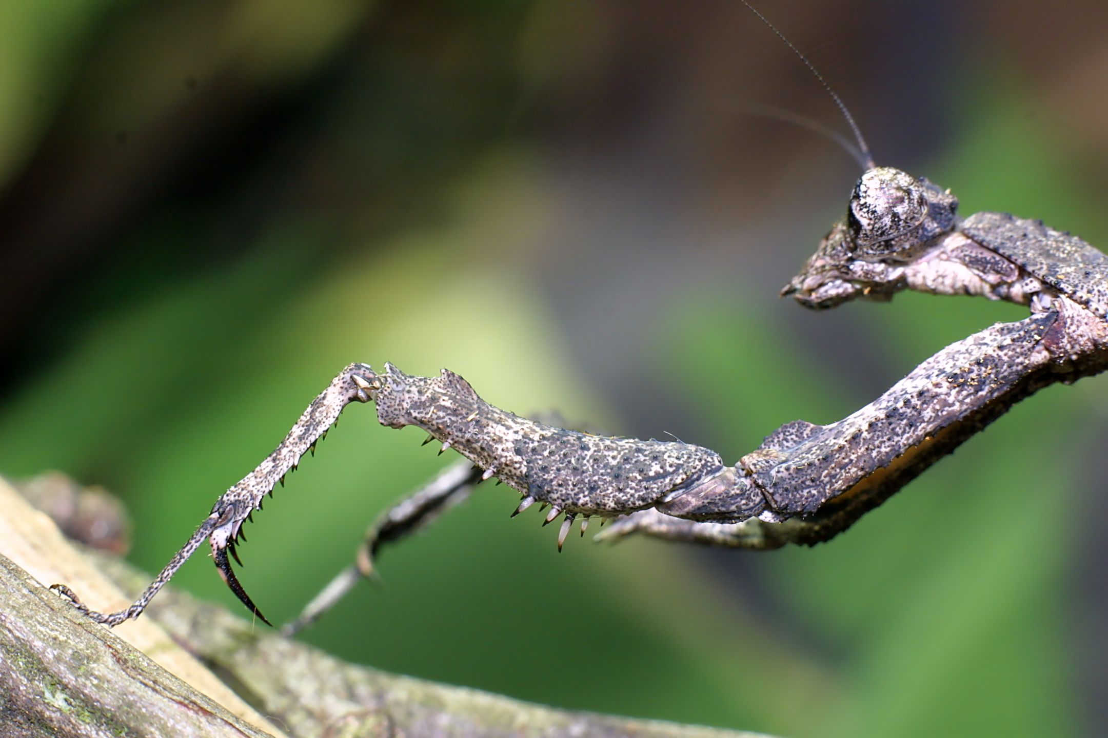 Fangbein